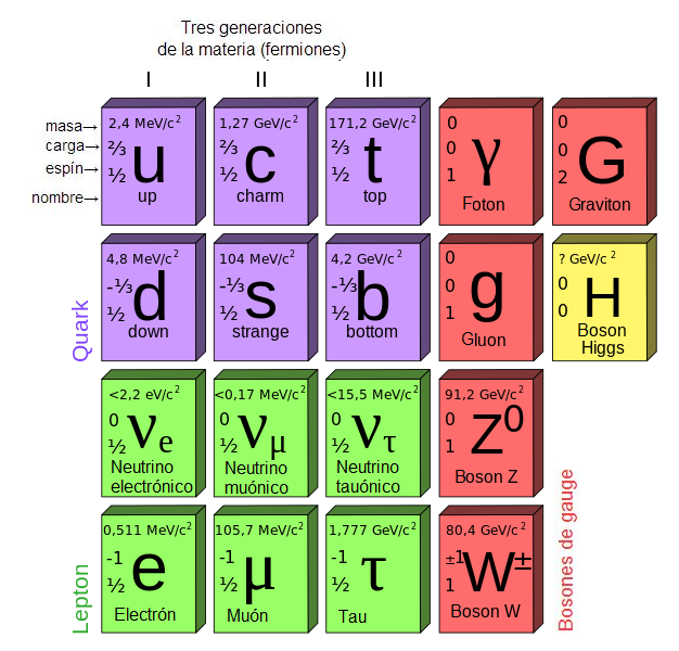 Modelo standard particulas subatómicas